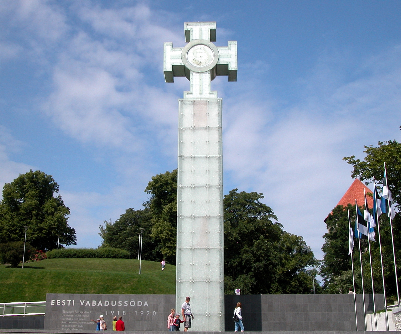 Tallinn: Denkmal für den Estnischen Freiheitskrieg (Eesti Vabadussõda) 1918-1920.